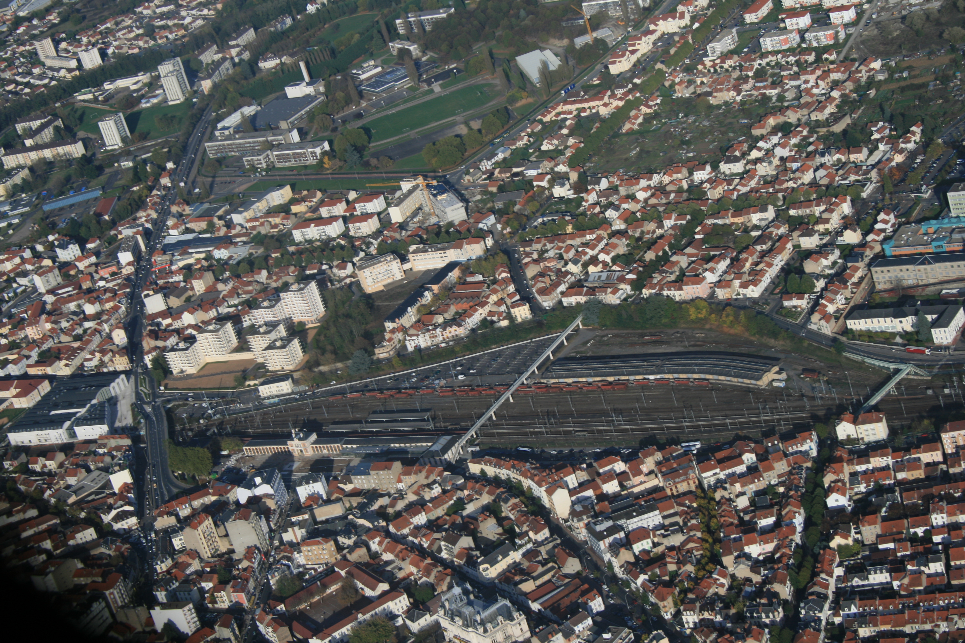 Vue aérienne de la gare de Vichy (Allier).